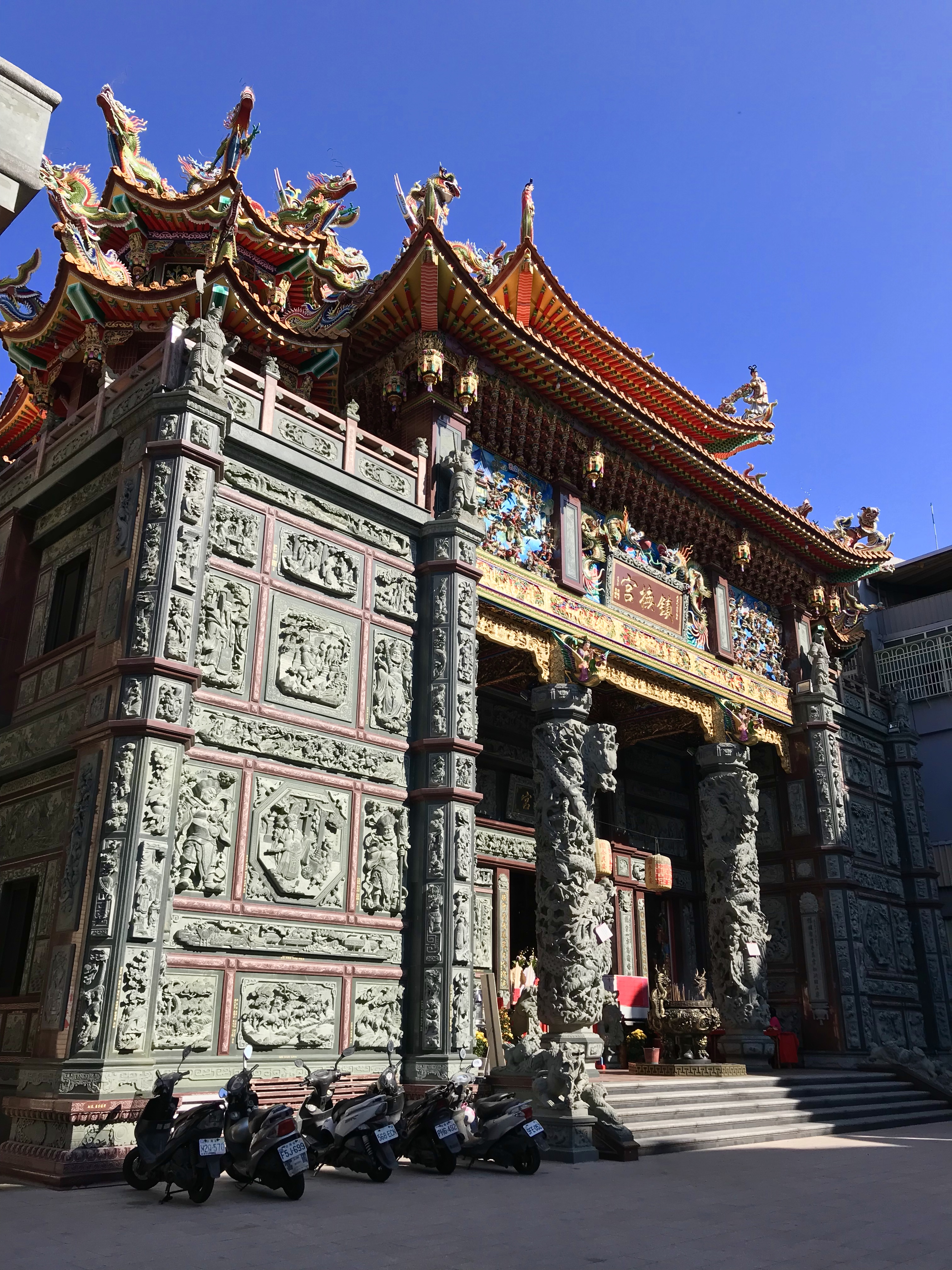 鎮撫宮一景